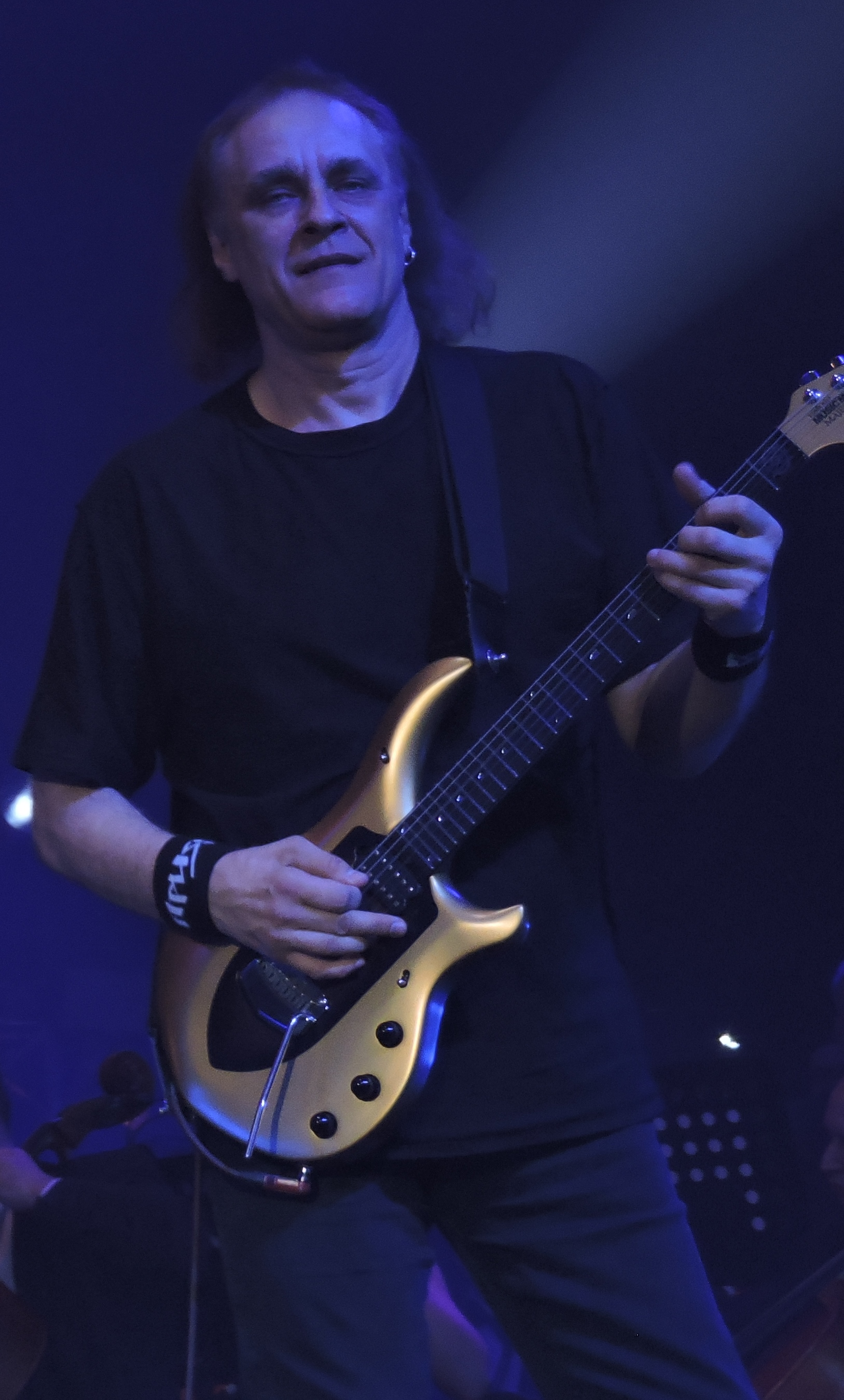 Владимир Холстинин